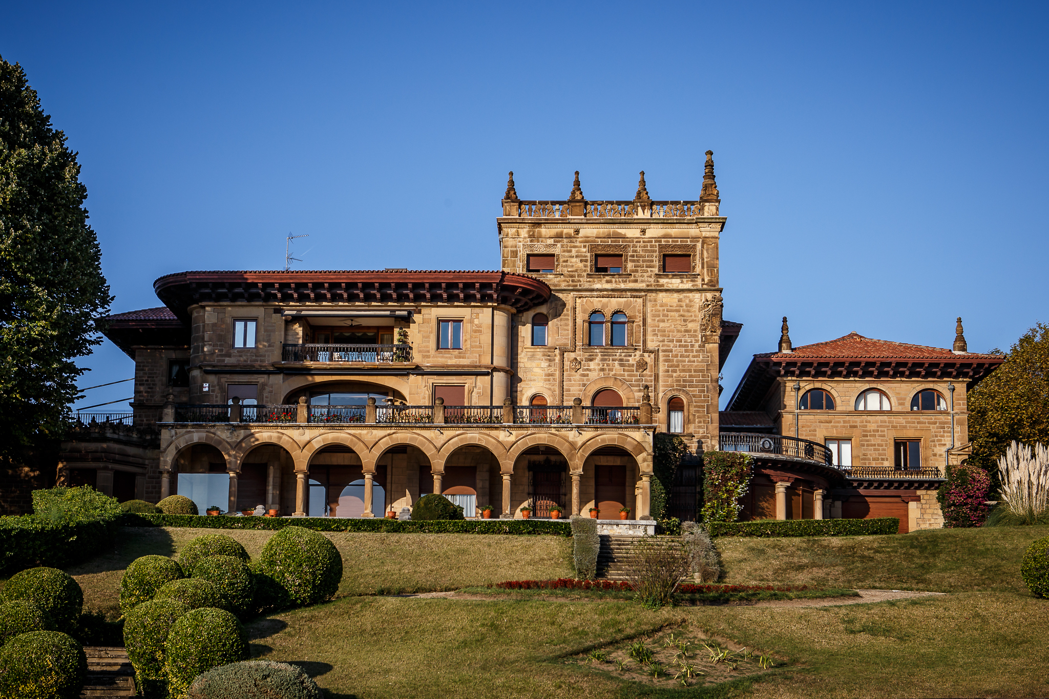 Luis Lezama Leguizamón jauregia